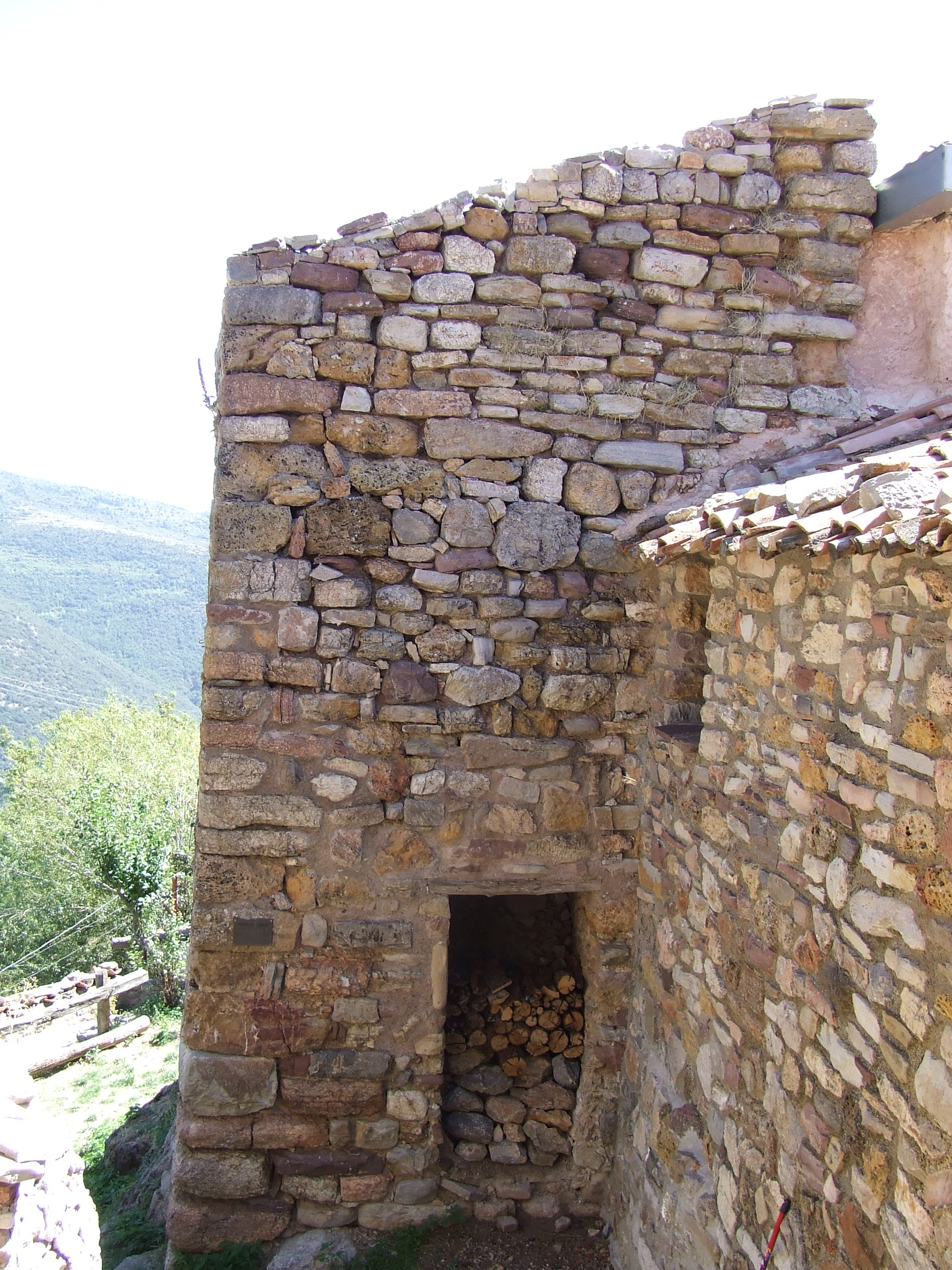 La Torre del Carlà d'Antist (la Pobleta de Bellveí, la Torre de Cabdella)